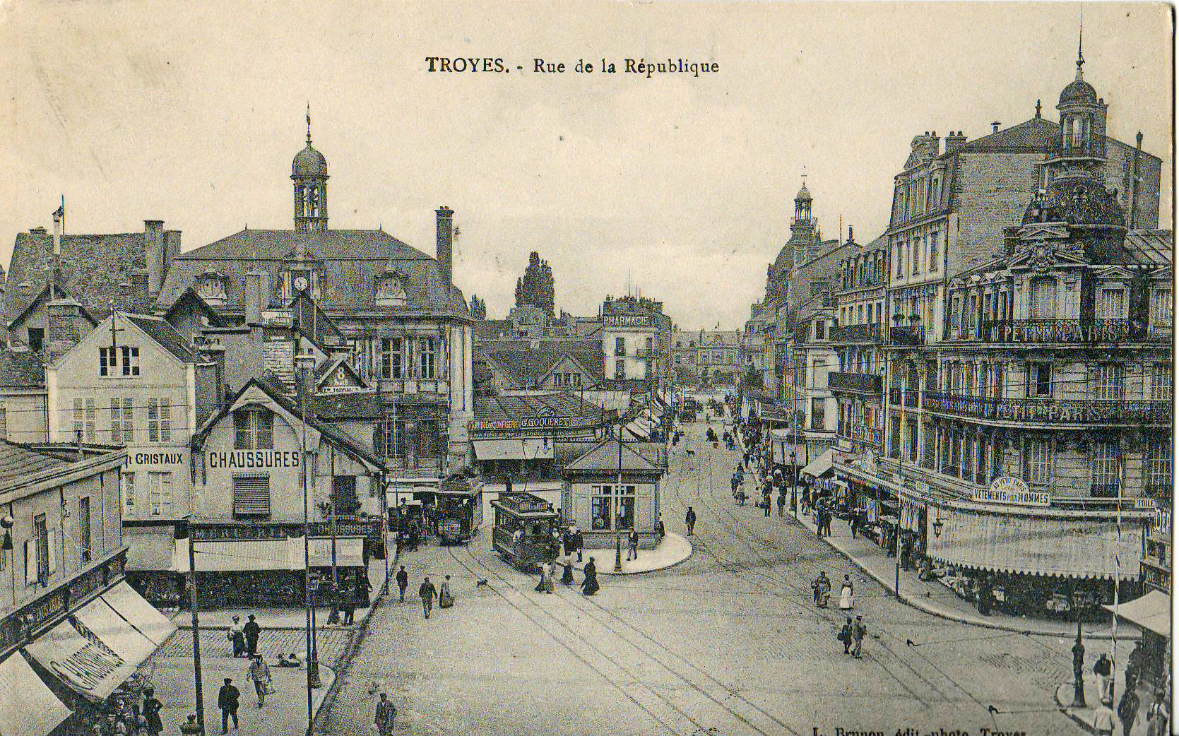 Carte postale ancienne éditée par L. Brunon à Troyes : TROYES - Rue de la République